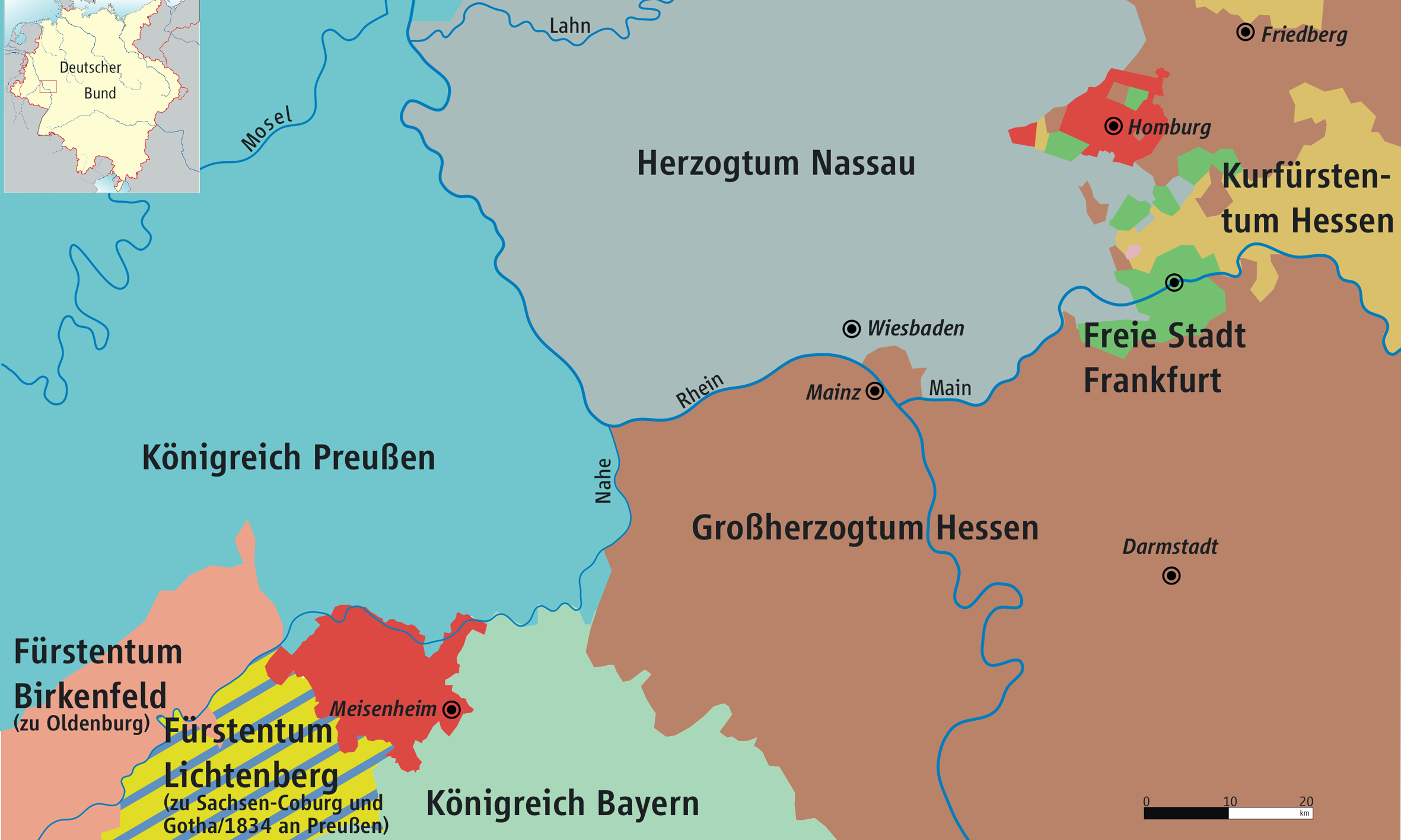 Karte von Hessen-Homburg und Mittelrheingebiet 1816–1866 / Map of Hesse-Homburg and Middle Rhine 1816–1866